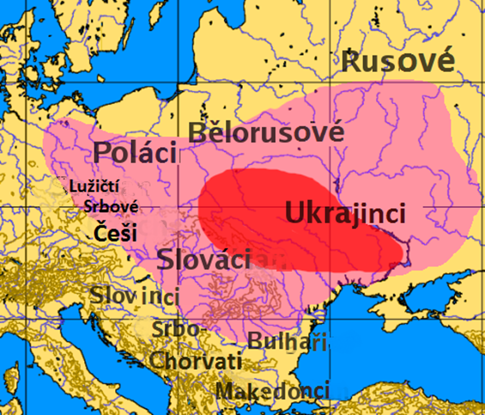 Rozšíření Slovanů po Evropě, červeně označena oblast prapůvodu Slovanů